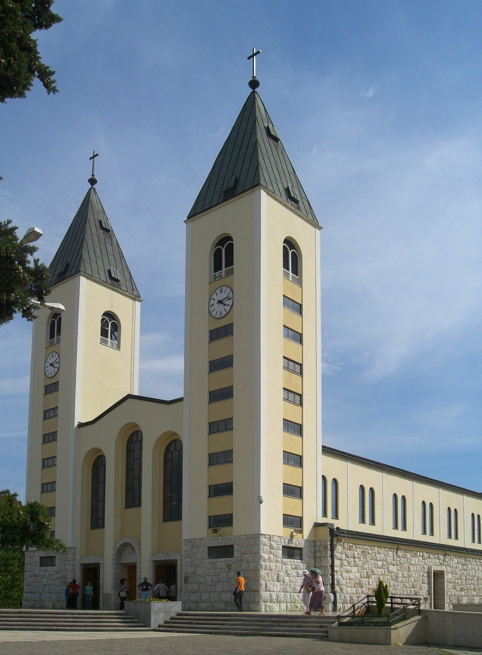 Chiesa di San Giacomo Maggiore, Megiugorie